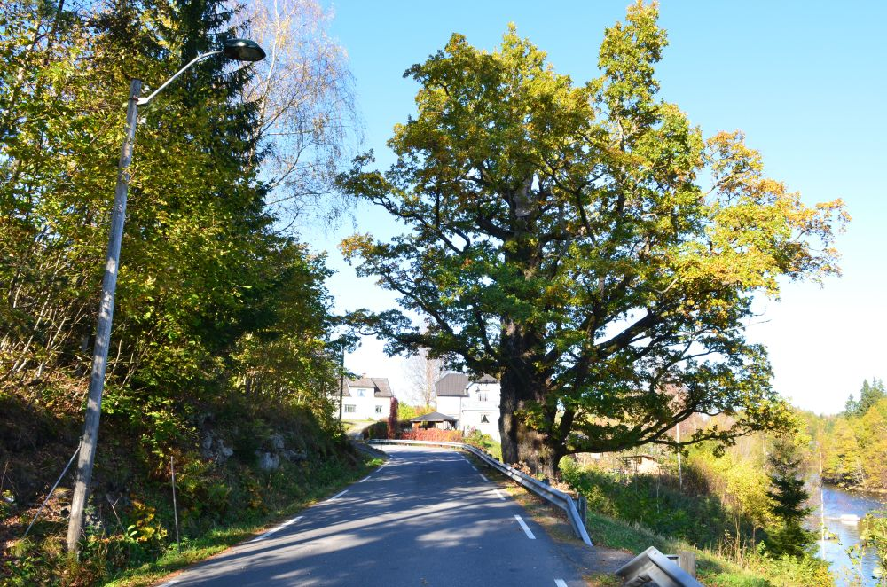 Kjoseeika er en av de eldste naturfredningene i Norge.